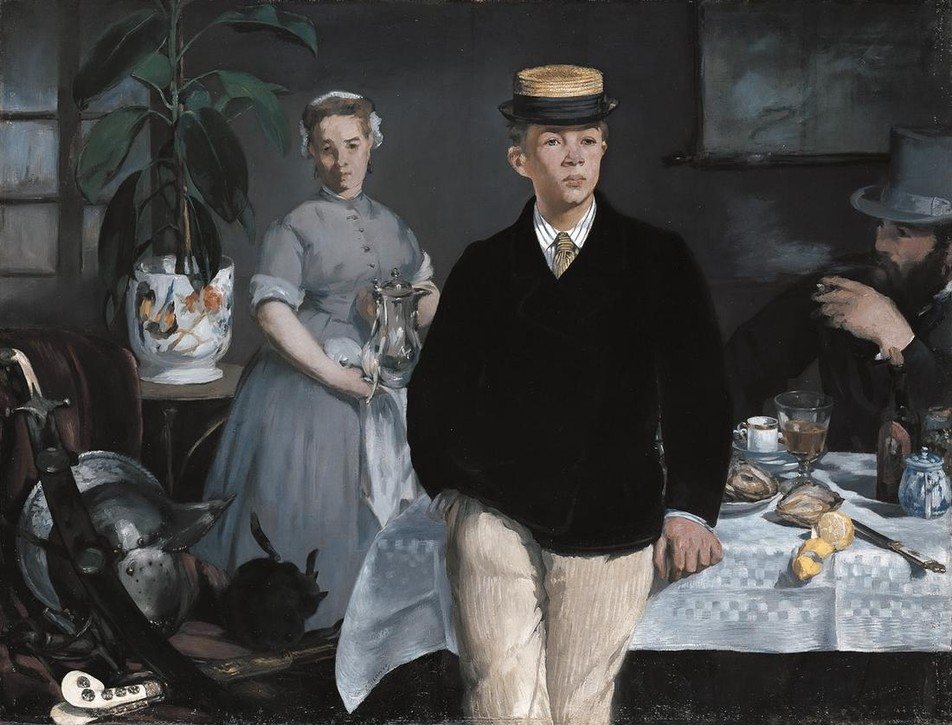 L'homme au premier plan est le peintre Joseph-Auguste Rousselin